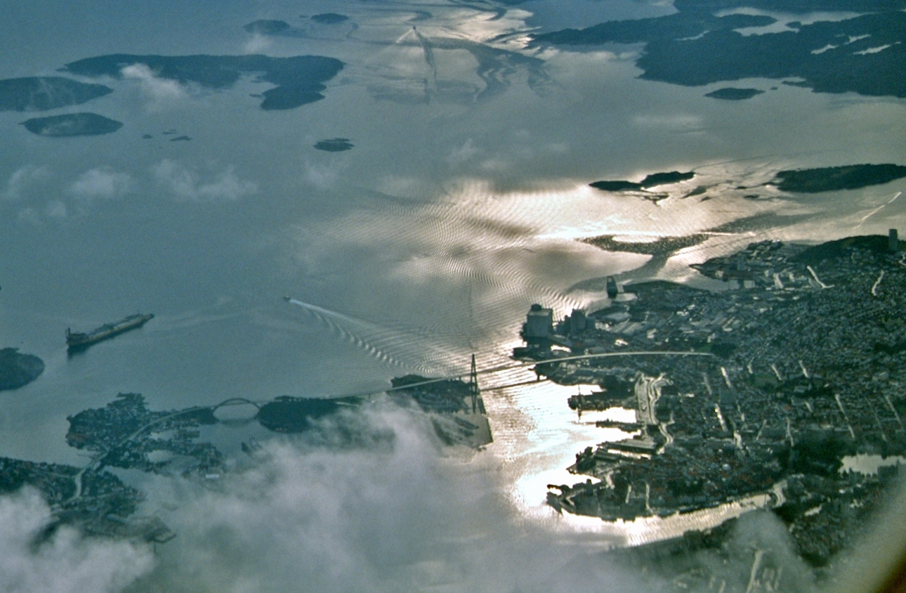 Stavanger, Luftaufnahme